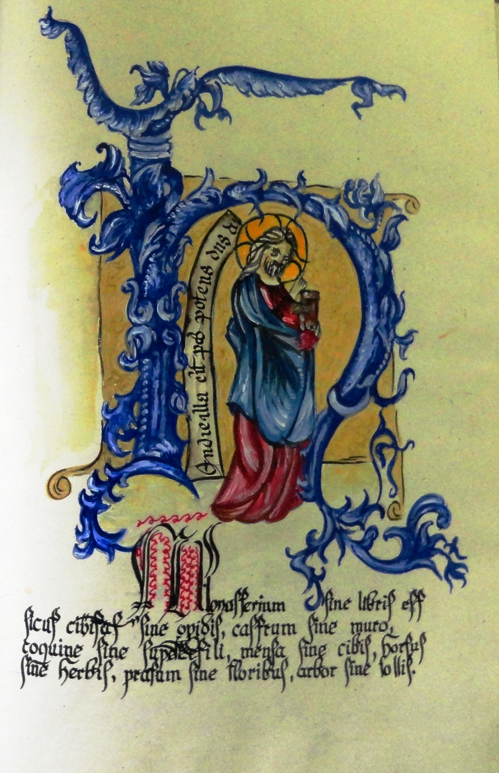 Mönche des Kartäuserklosters in Seiz verfassten die kunstvollen Manuskripte, die in der Bibliothek aufbewahrt sind.